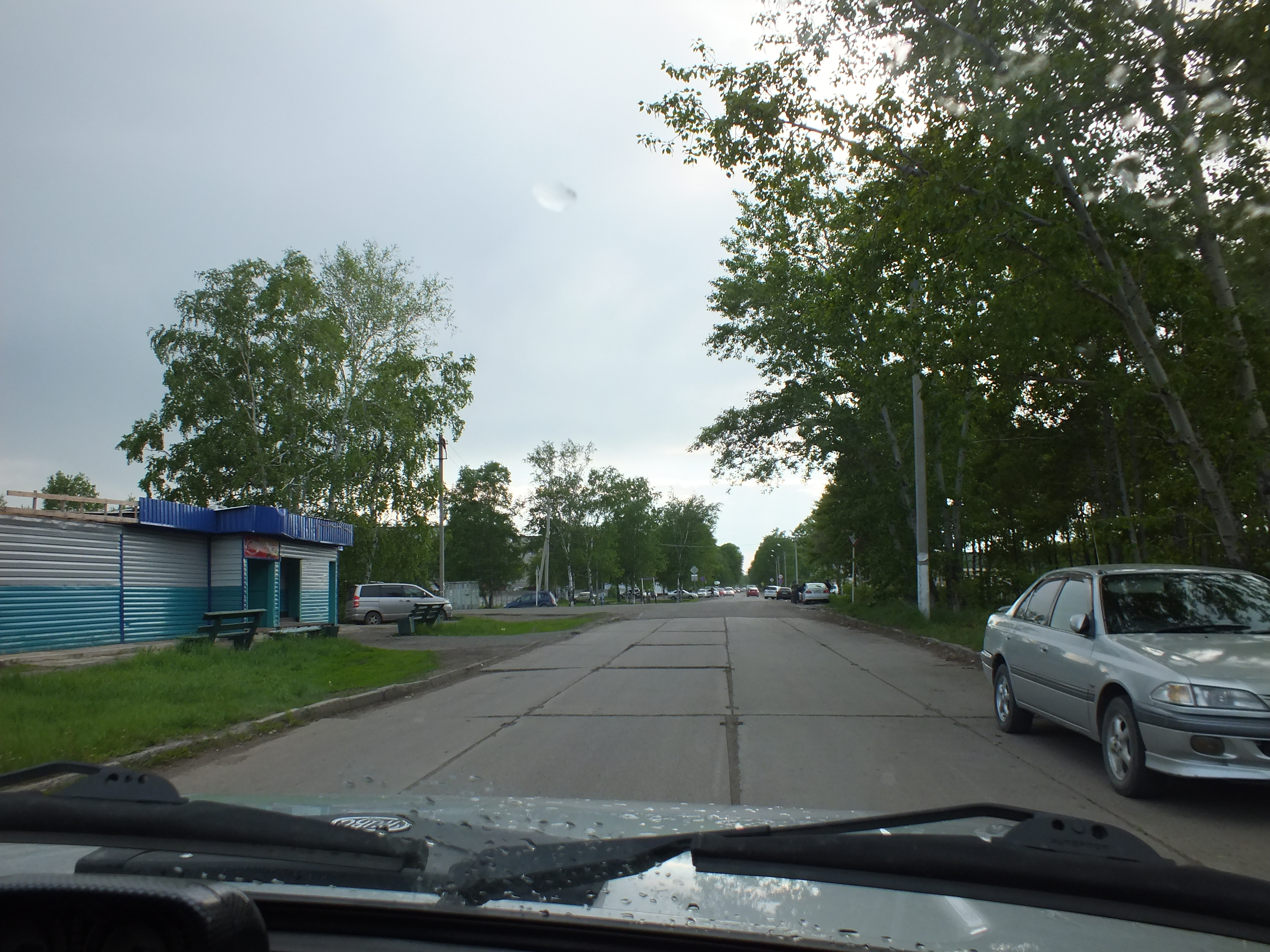 Аэропорт Хурба Комсомольский район